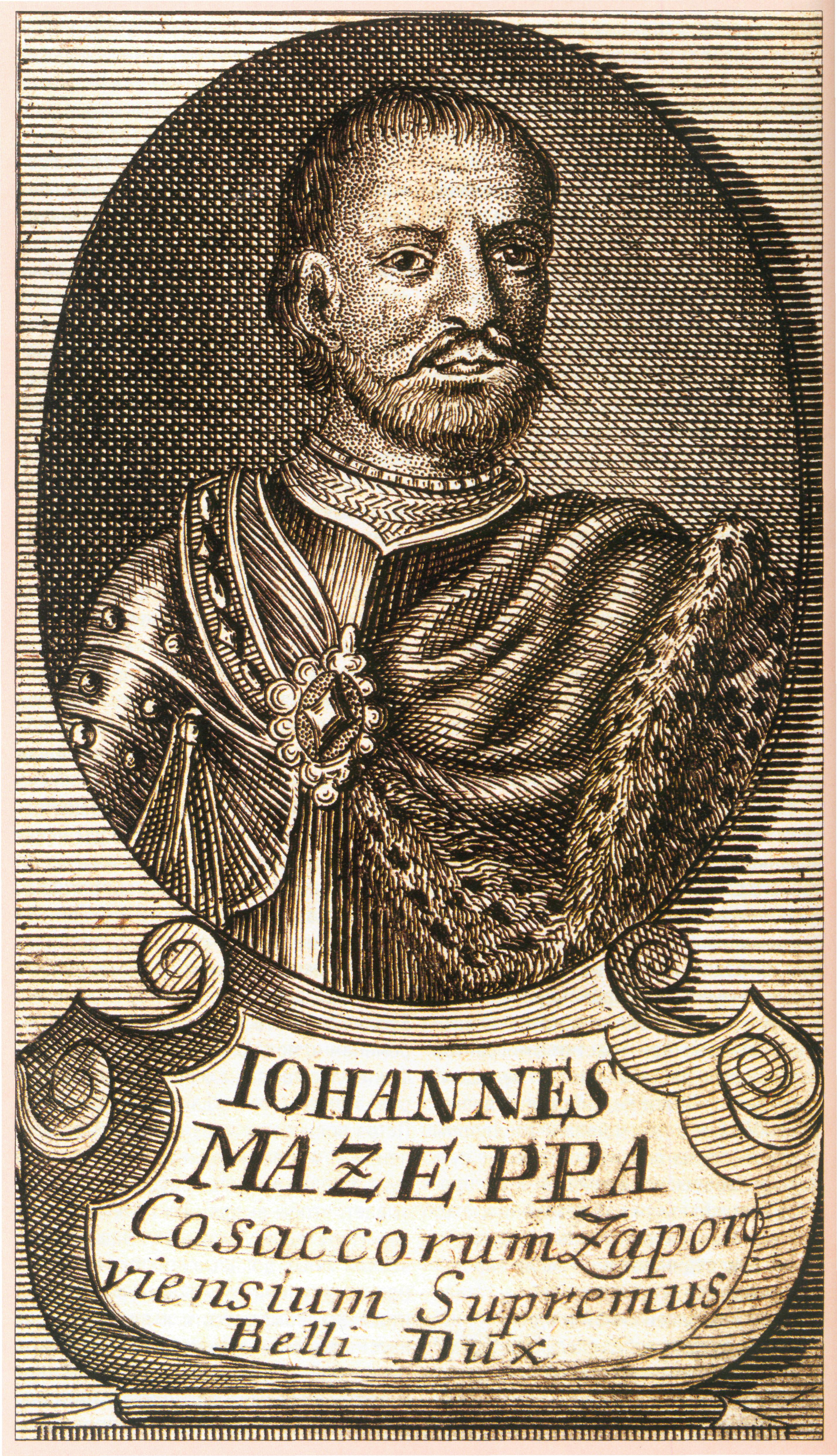 И. Бернигерот. Верховный военный вождь запорожских казаков Иван Мазепа (латынь). Немецкая гравюра первой половины XVIII века.